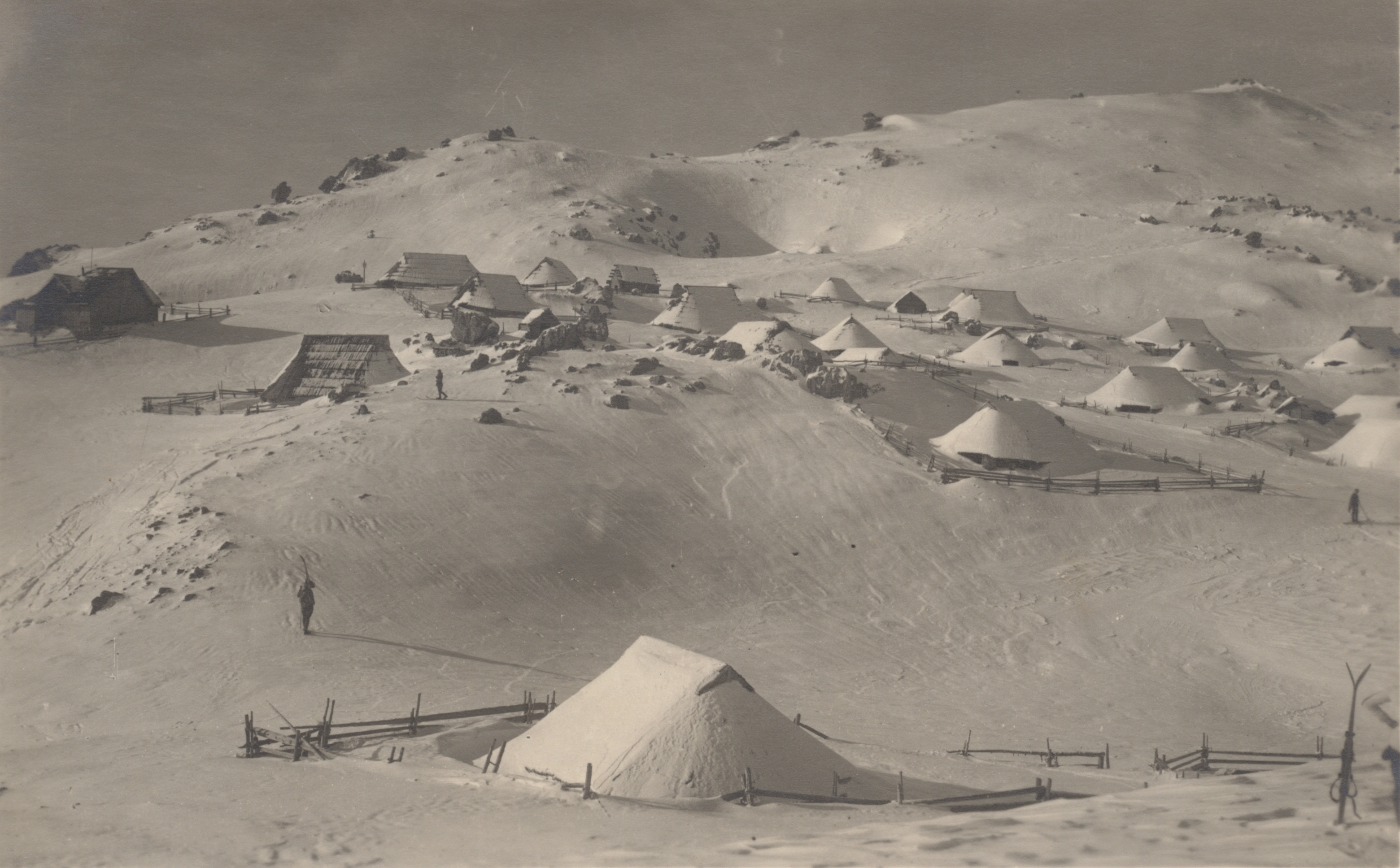 Velika Planina.